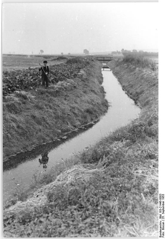 Eilsleben, Entwässerungsgraben des Bruchs Zentralbild Biscan 25.9.1953 1000 ha Kulturland werden gewonnen. Dank der großzügigen Hilfe unserer Regierung, die bisher 800.000 DM zur Verfügung gestellt hat, kann der sogenannte Seelsche Bruch in der Nähe von Eilsleben trockengelegt werden. Zu diesem Zweck werden 70 cm tiefe Gräben durch den ganzen Bruch gezogen und Drainröhren in einer Gesamtlänge von 610 km gelegt. Durch dieses Binnenentwässerung werden 1000 ha Moorwiesen, die mehr als 400 Bauern und Volksgütern der Umgebung gehören, in fruchtbaren Ackerboden verwandelt. UBz: Einer der Vorflutgräben, die in den letzten Jahren angelegt wurden, um den Abzug der Wassermengen zu ermöglichen. In diesem Jahre sollen noch etwa 10 Kilometer solcher Entwässerungsgräben angelegt werden.